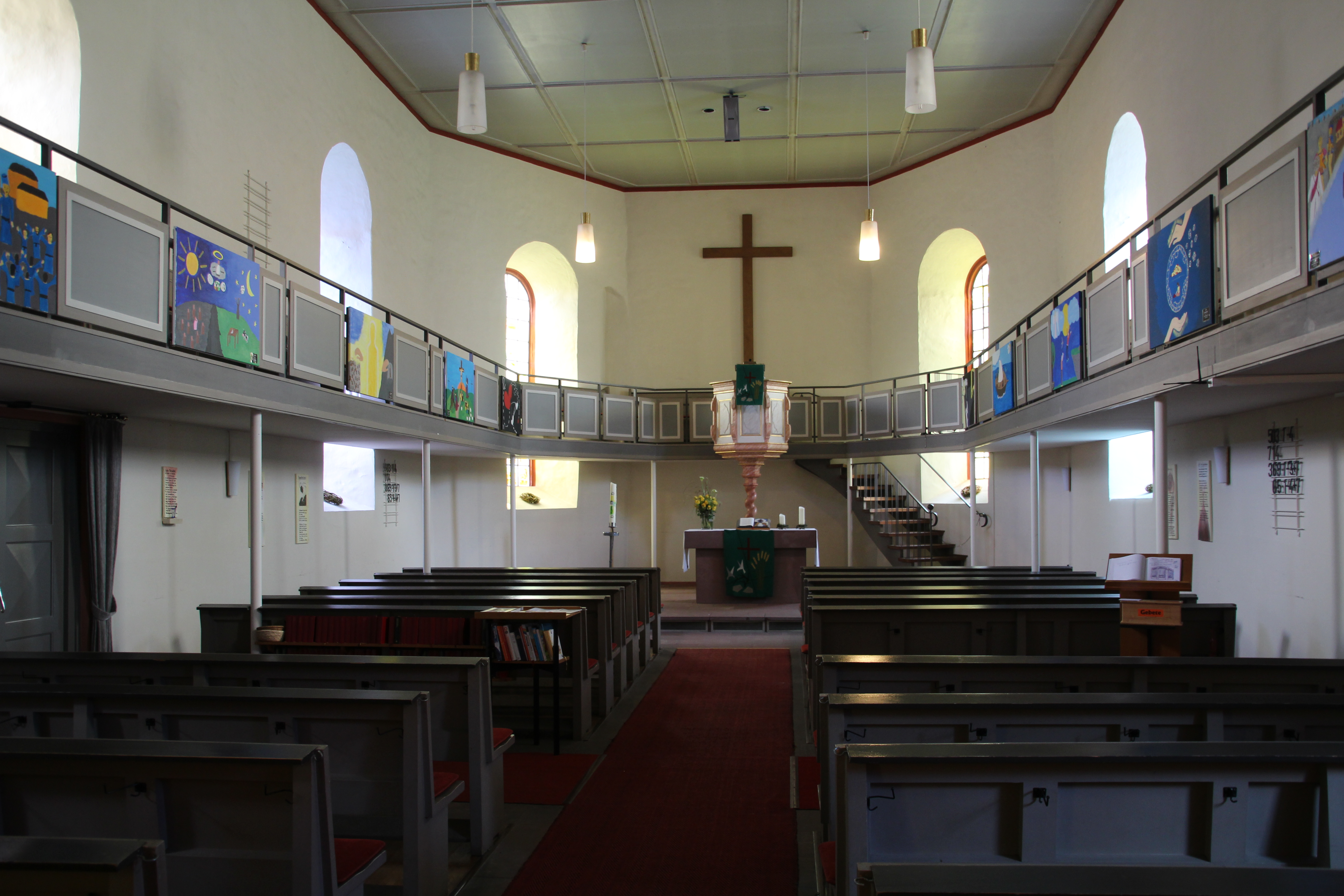 Ev. Kirche